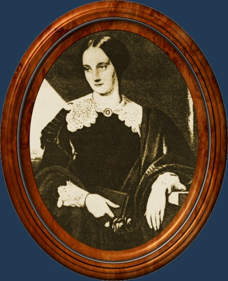 Agnes Luckemeyer, später als Schriftstellerin Mathilde Wesendonck bekannt